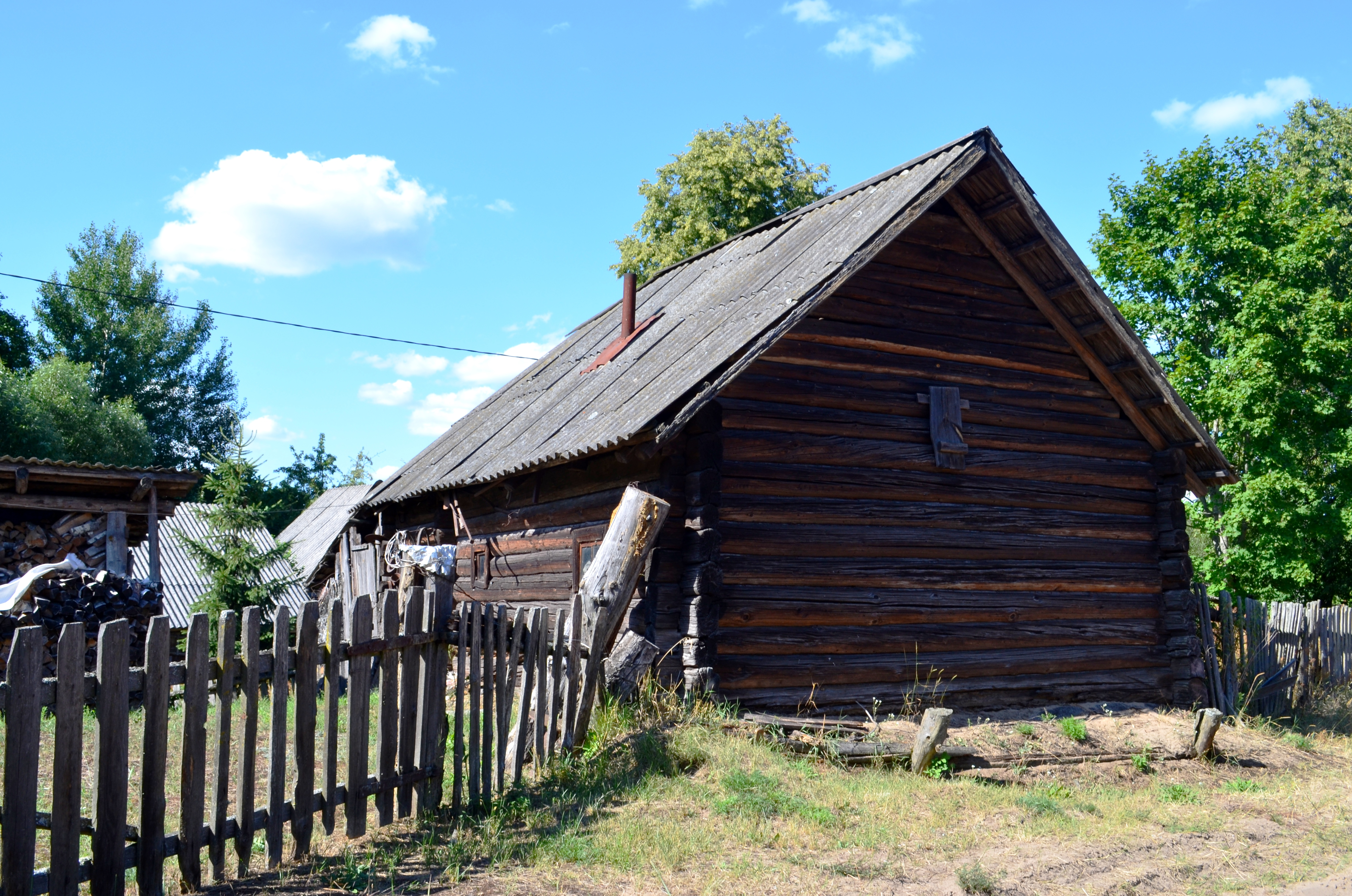 Antžeminis rūsys su krosnimi, Musteika, Varėnos r.